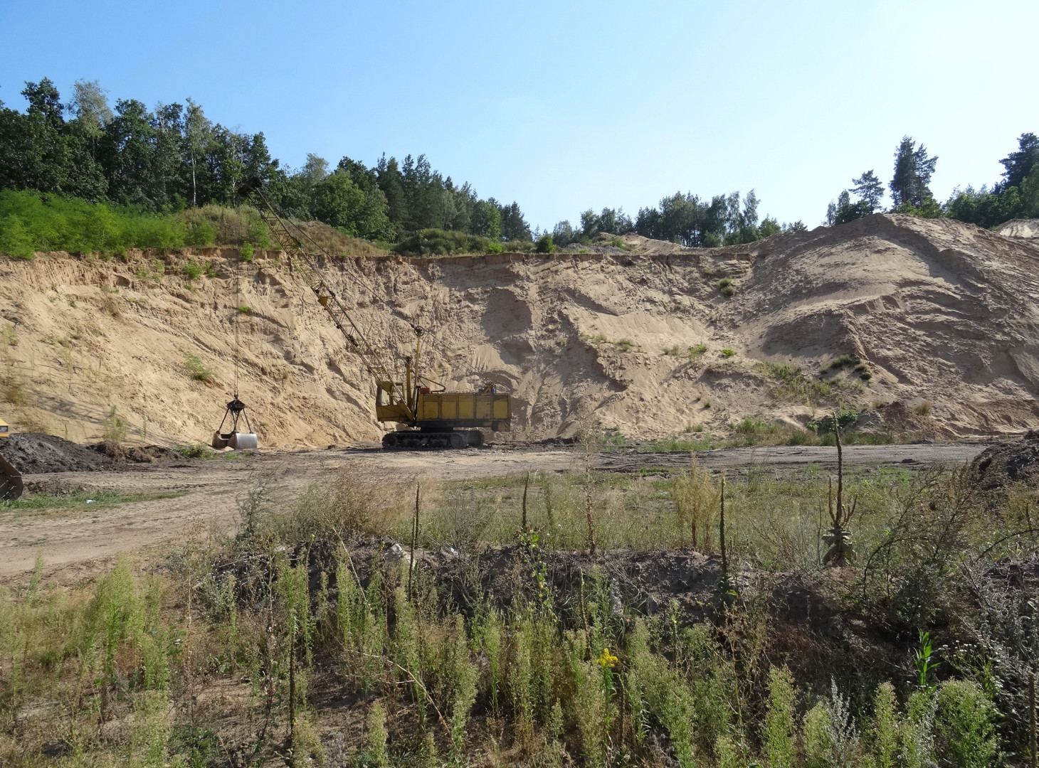 Gzin Dolny, gmina Dąbrowa Chełmińska